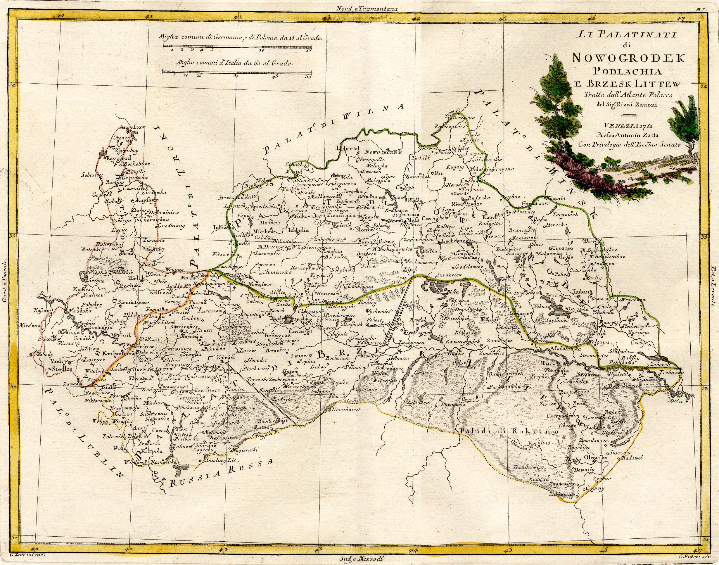 Беларуская (тарашкевіца): Мапа Наваградзкага, Падляскага і Берасьцейскага ваяводзтваў